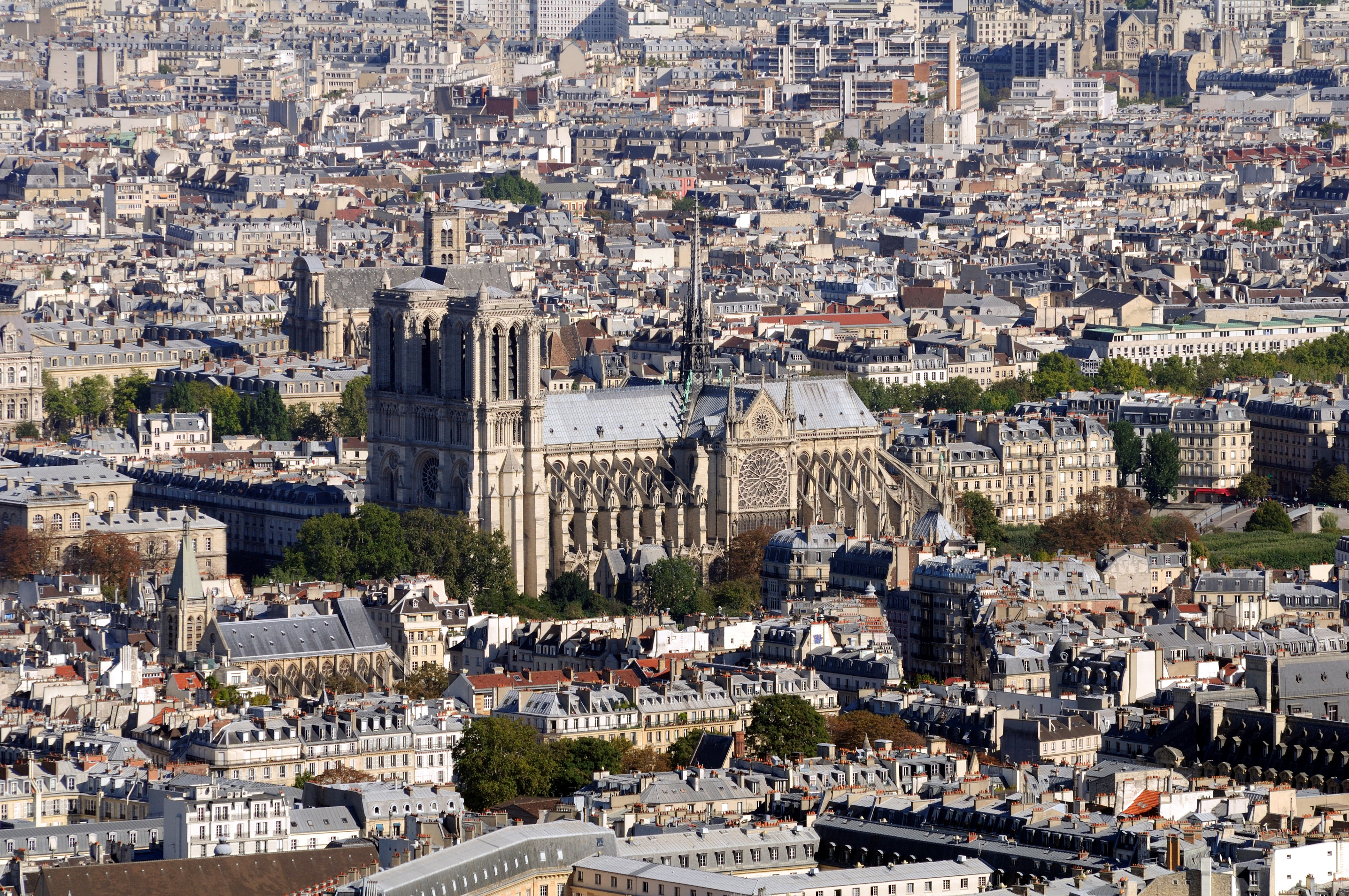 Paris: Notre Dame